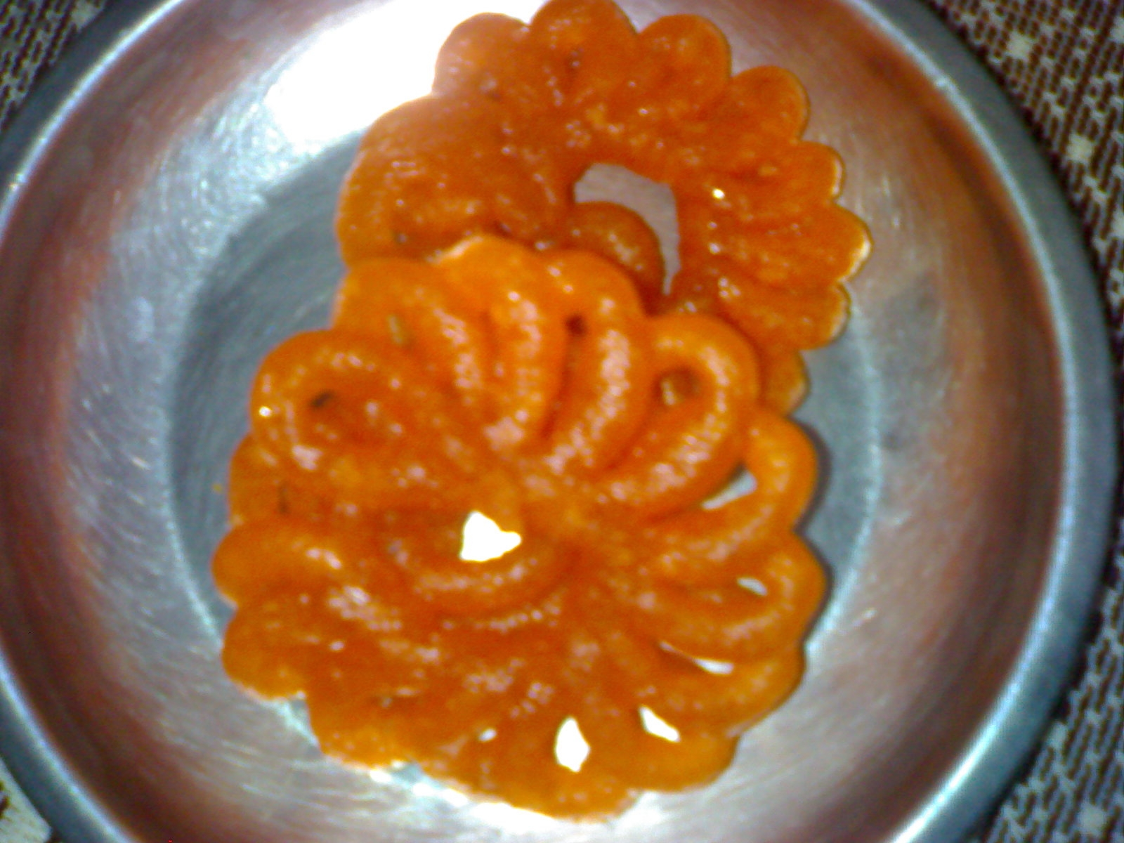 Jaangiri, a popular Indian sweet.